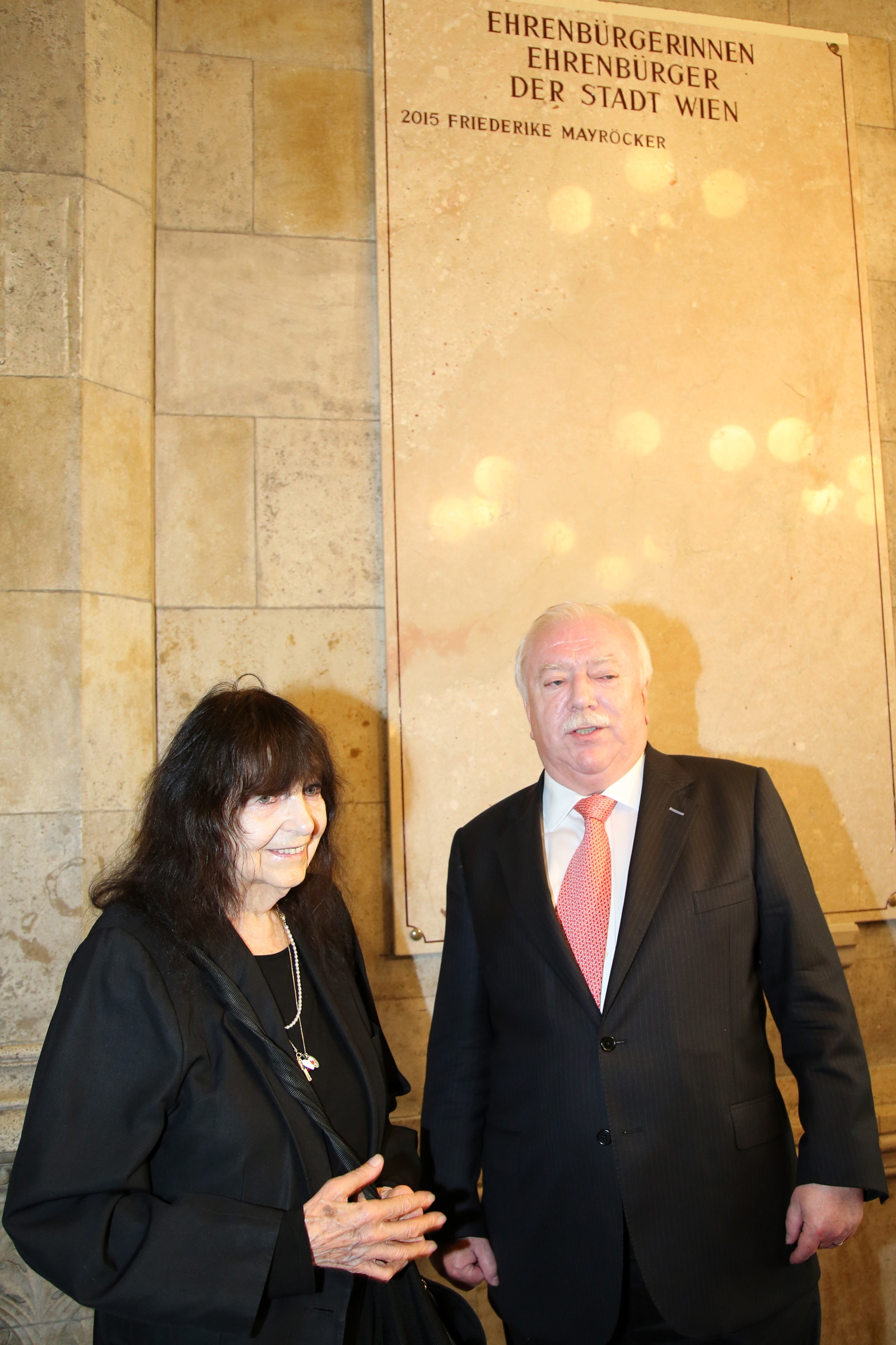 Mayröcker_Friederike,Häupl_Michael-5813